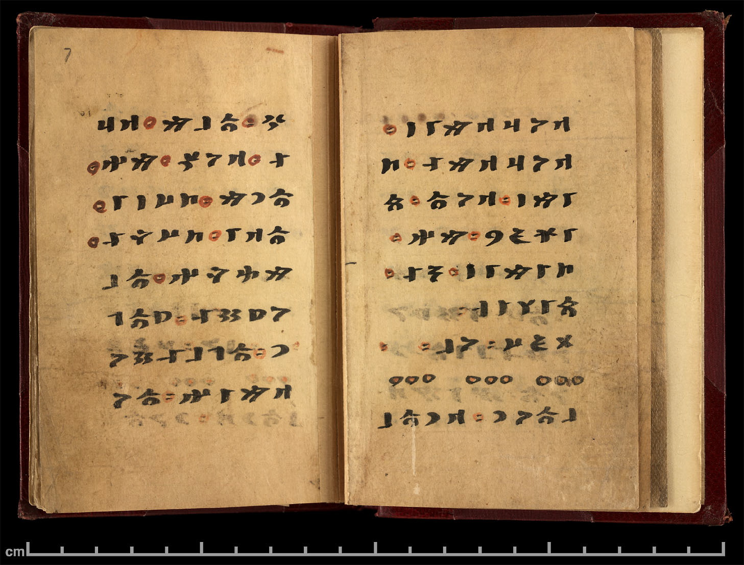 "Irk Bitig Fal Kitabı" page 7